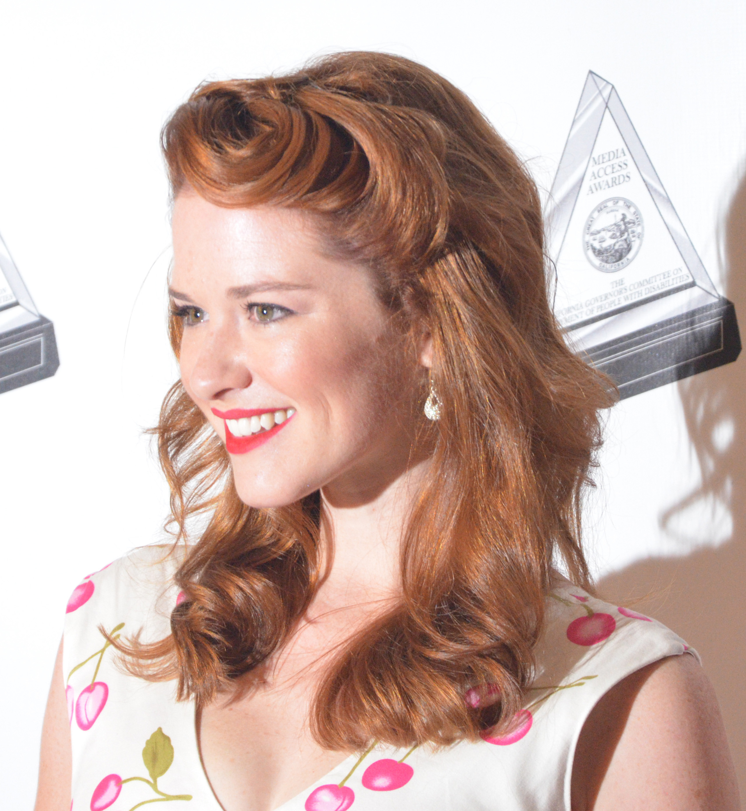 Sarah Drew - DSC_0104